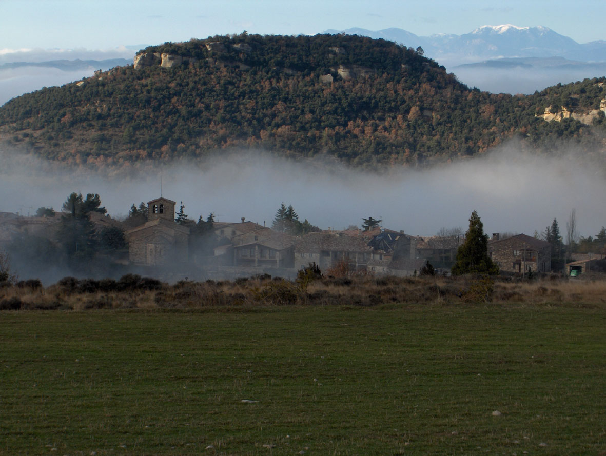 Vista general de Tavertet, al fondo los pirineos